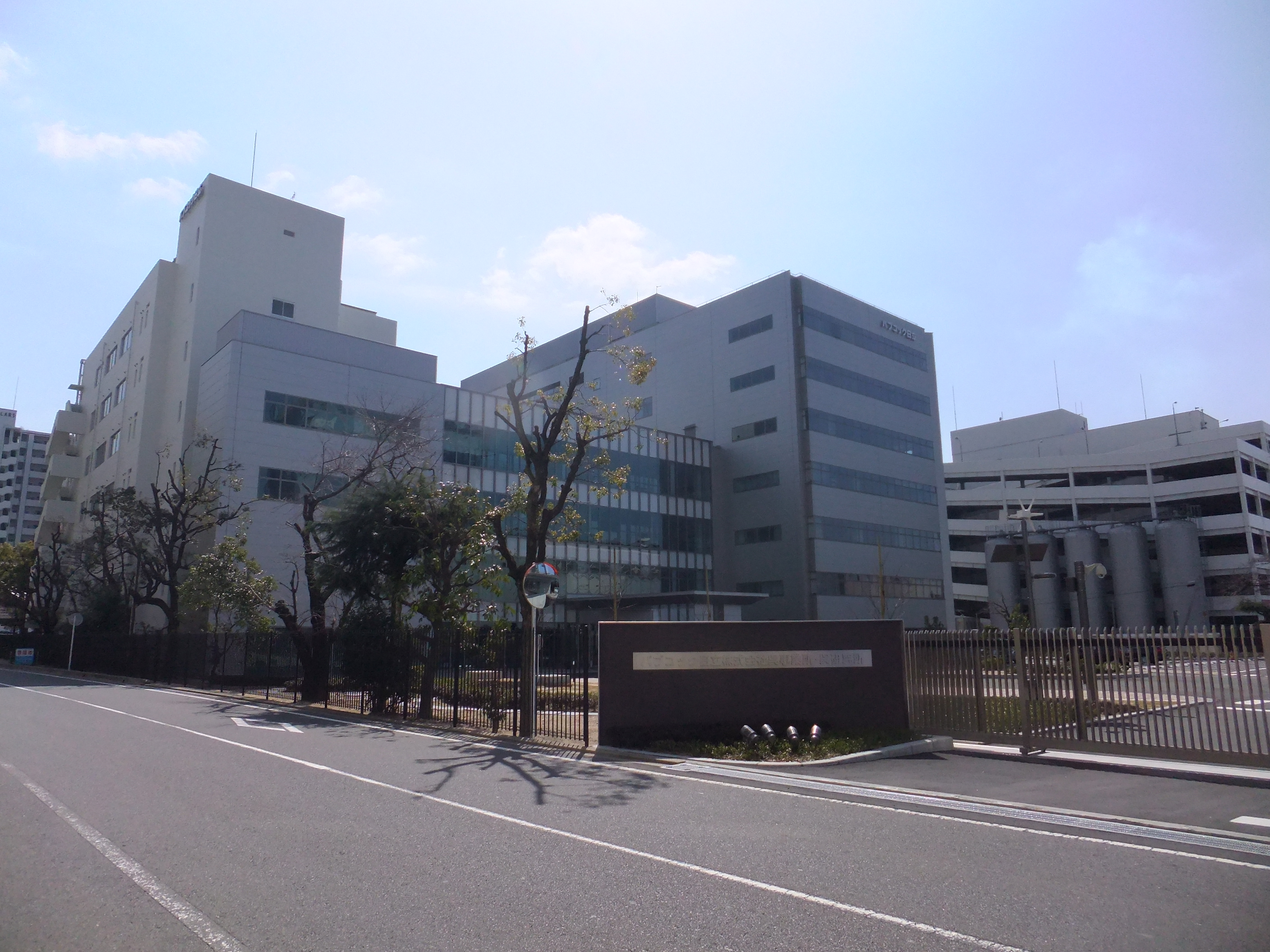 バブコック日立呉研究所